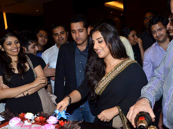 Vidya Balan at success bash of 'Kahaani'